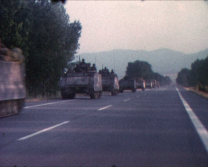 Zypernkonflikt 1974: MTW-Kolonne der griechischen Armee (Region Katerini) in der Verlegung an die türkische Grenze.